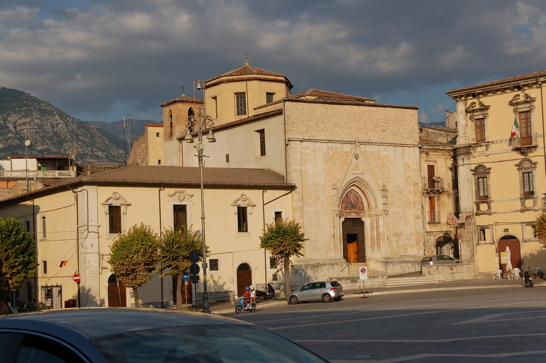 Sulmona 2011